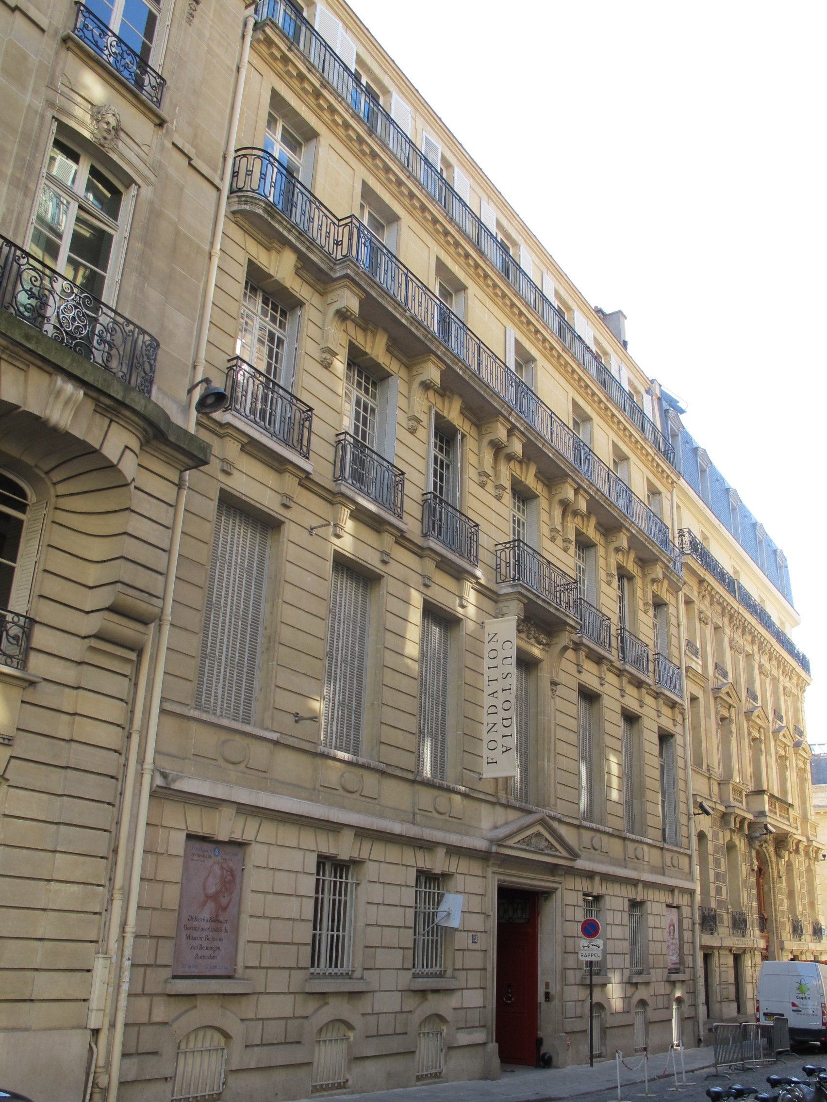 Institut néerlandais, Paris